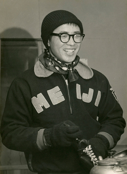 Keiichi Suzuki